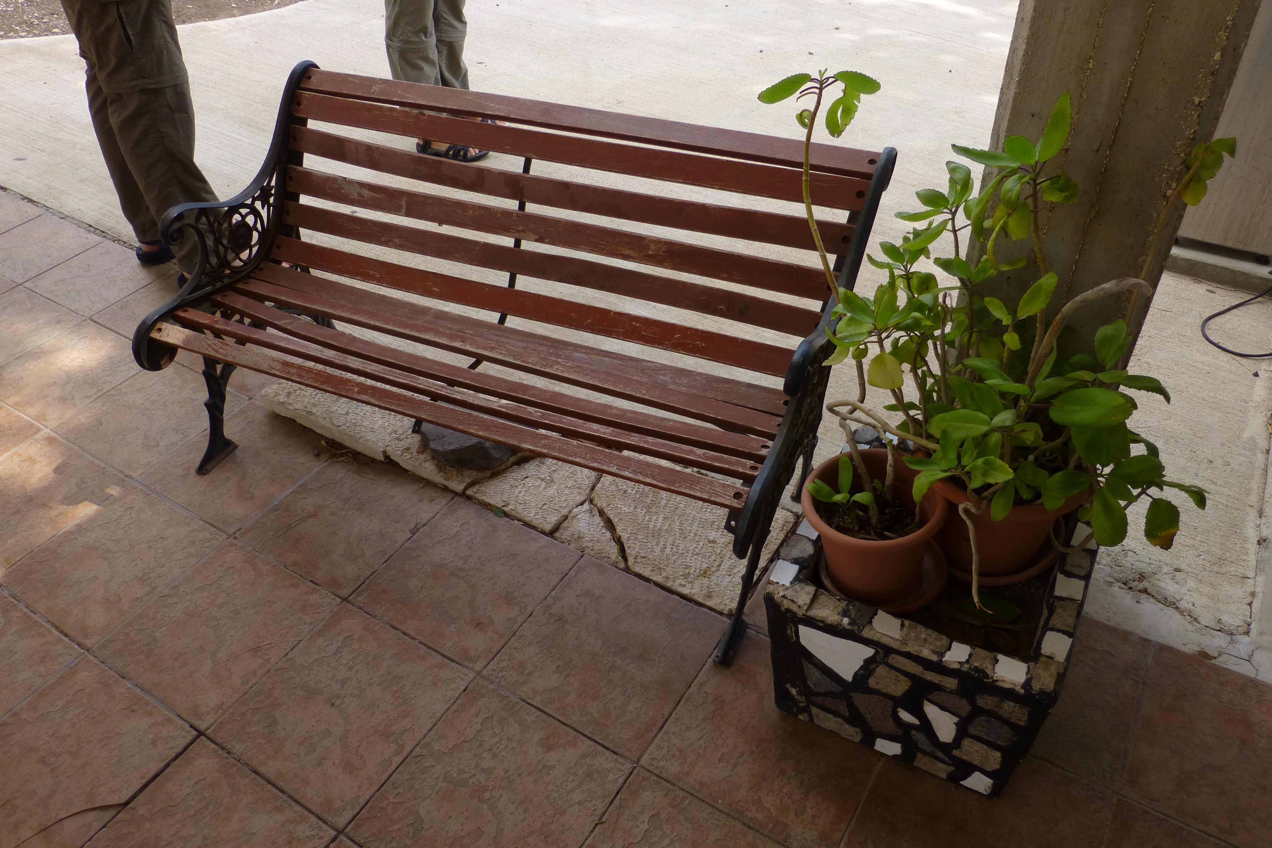 מוזיאון בית שטורמן המצוי בקיבוץ עין חרוד מאוחד נוסד בשנת 1941 על ידי חבר הקיבוץ שמואל סבוראי כמוזיאון לטבע.